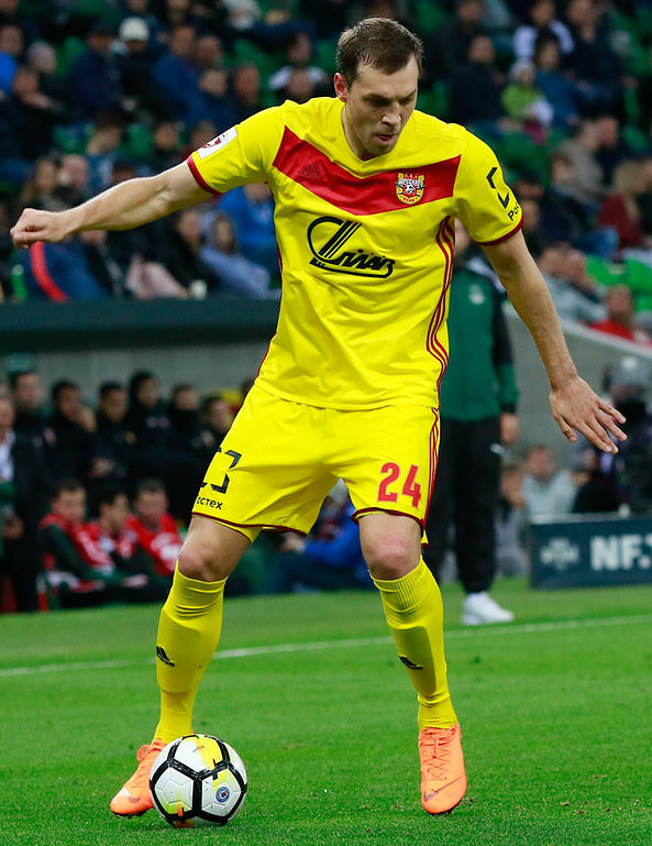 «Краснодар», который заслужил аплодисменты